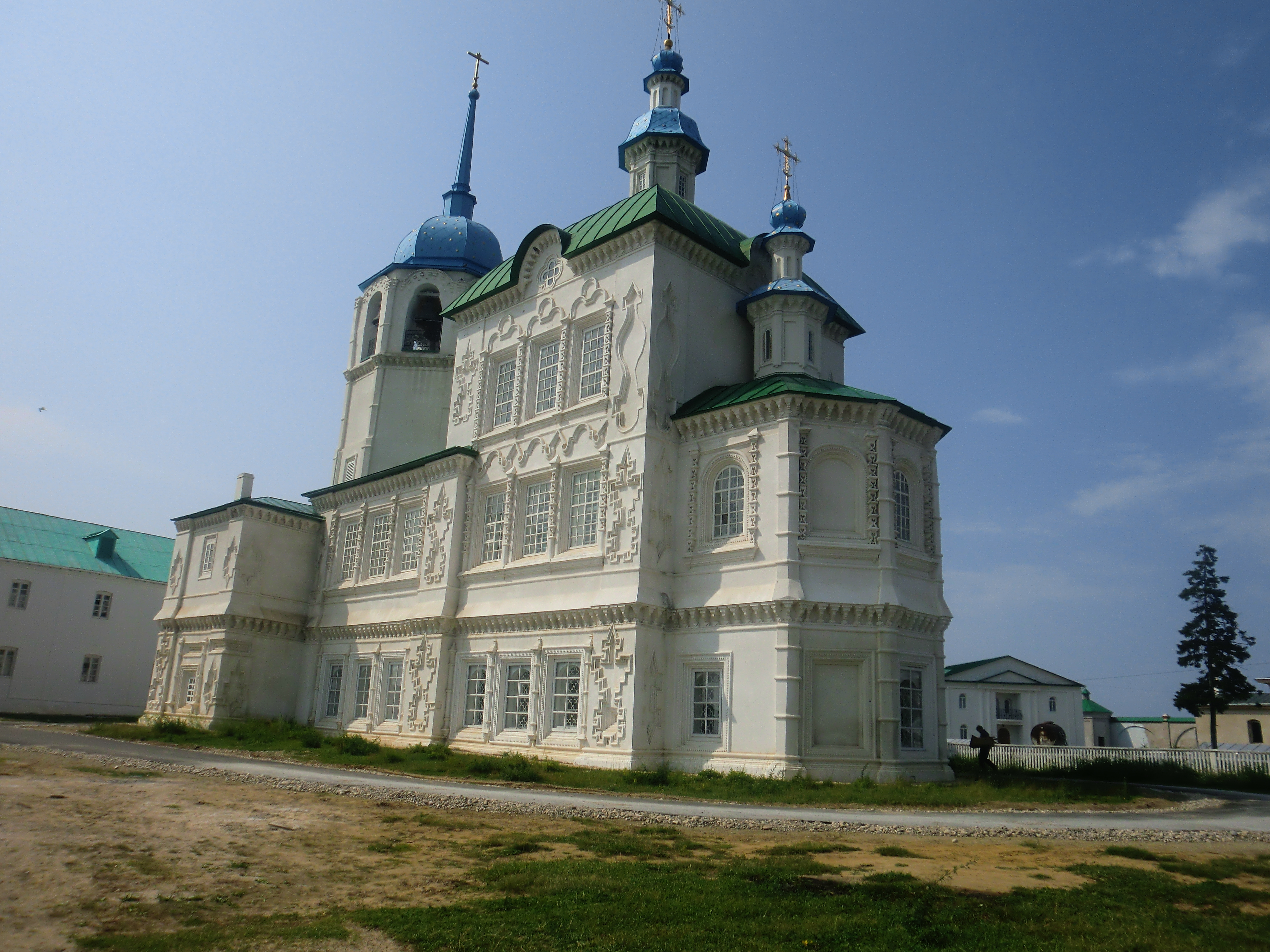 Монастырь Спасо-Преображенский Посольский (Республика Бурятия, Бабушкин, село Посольское)